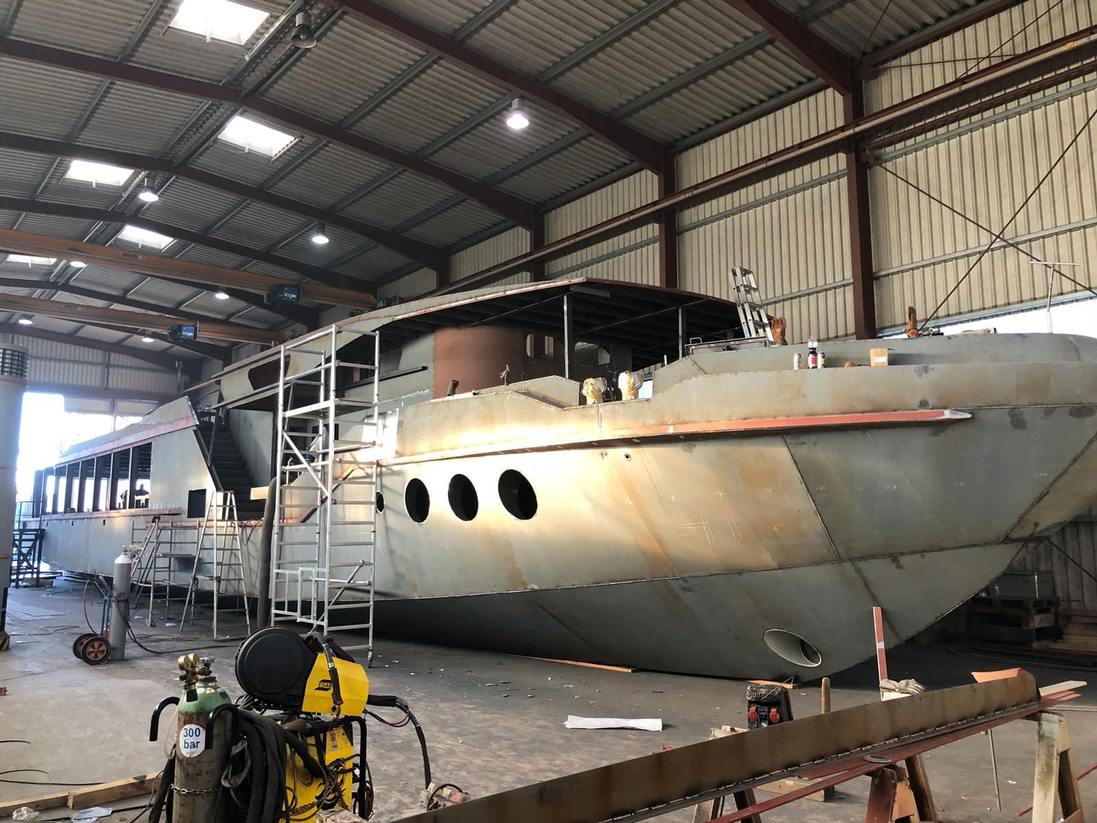 Fahrgastschiff Schwielowsee, Weisse Flotte Potsdam im Bau. Antrieb über zwei Elektromotoren, zwei Dieselgeneratoren zur Stromerzeugung sowie Akkus, die über Stromzapfsäulen im Haupthafen sowie im Technikhafen aufgeladen werden, Rollstuhlgerecht und Fahrradmitnahme